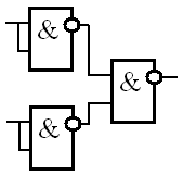 Loginis elementas ARBA, surinktas iš trijų elementų IR-NE